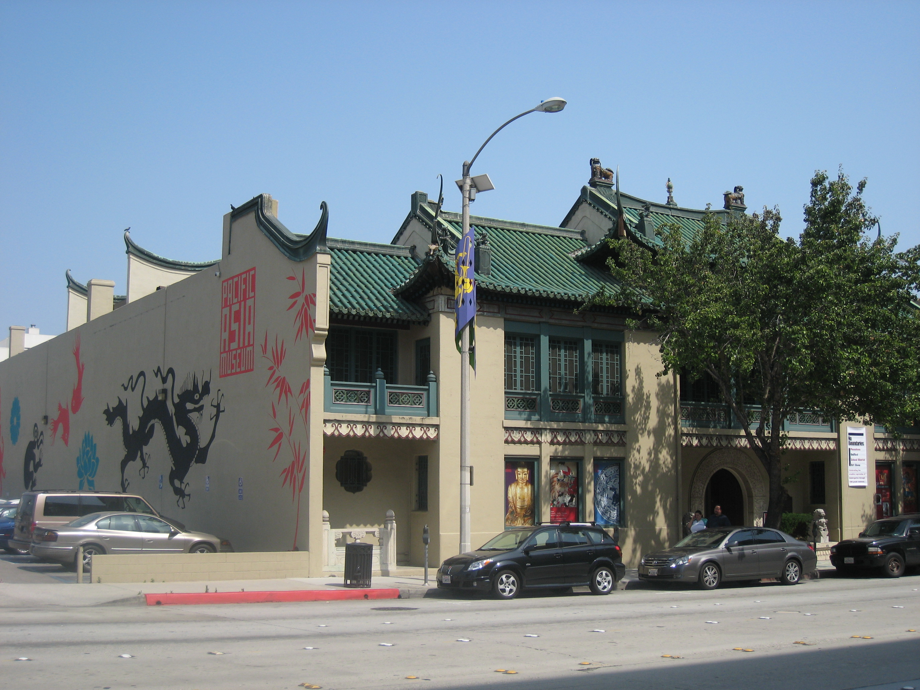 Pacific Asia Museum, Pasadena, California